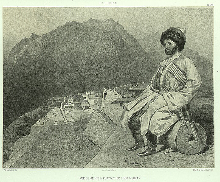 Daghestan.Ghimeri, portrait de Hadji-Mourad.